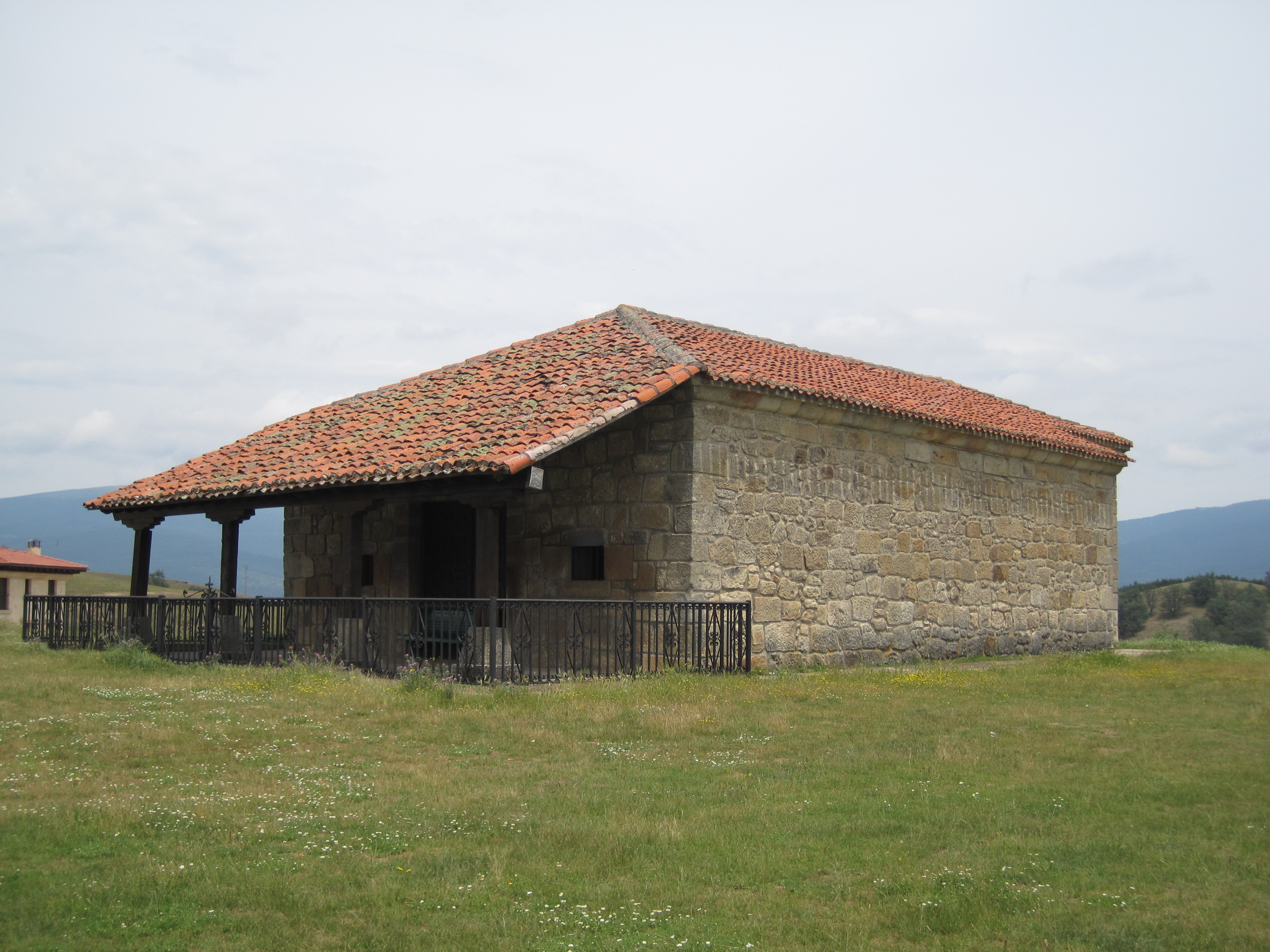 Ermita de San Roque, en Canicosa de la Sierra (Burgos, España).